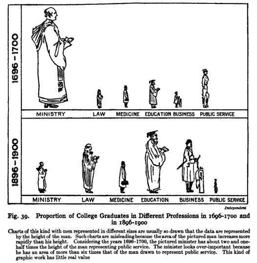 piktograma